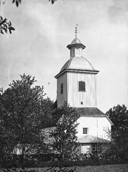 Böja kyrka 1904